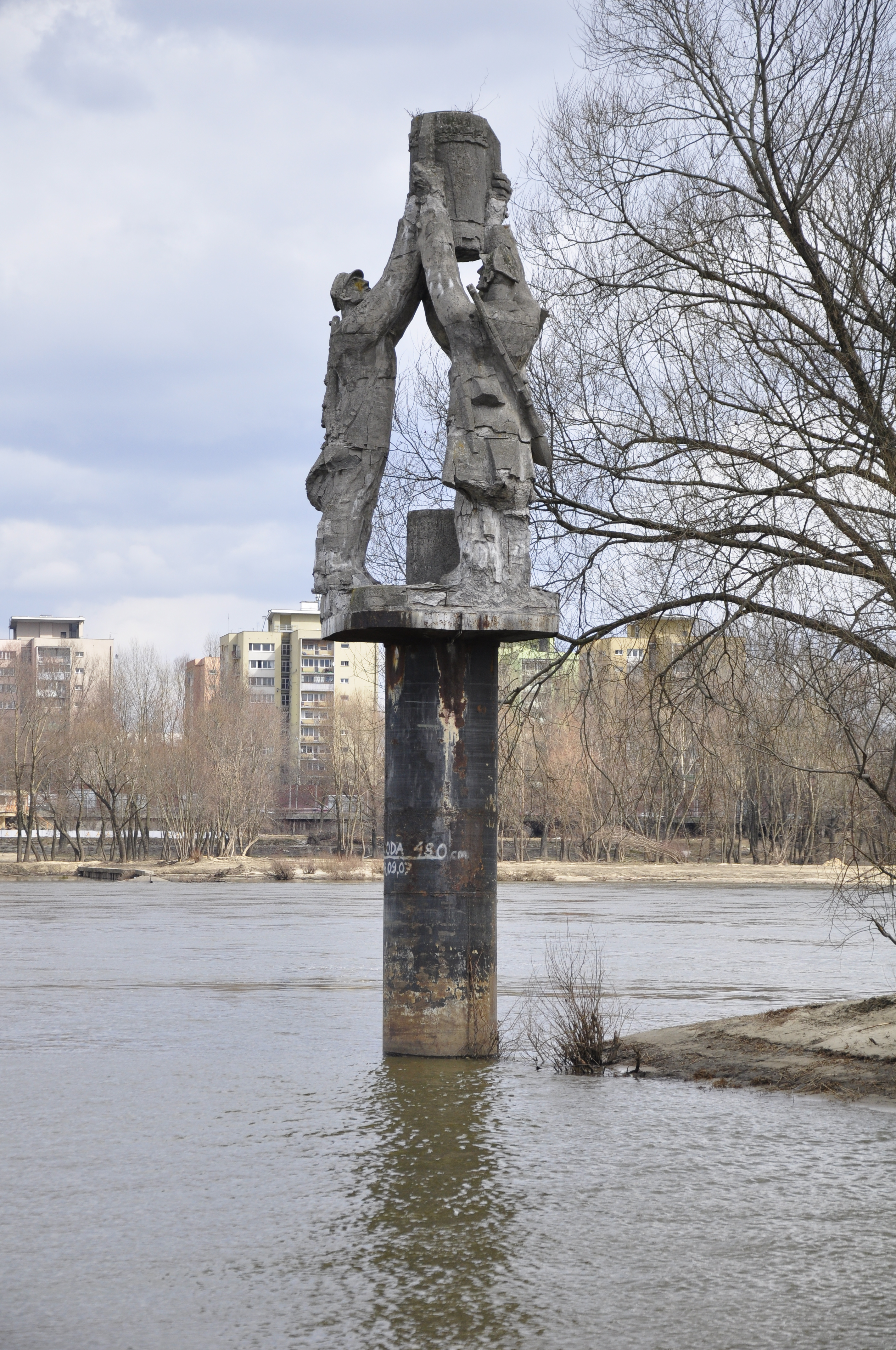 Czerniakow Hafen - Denkmal polnischer Pioniere